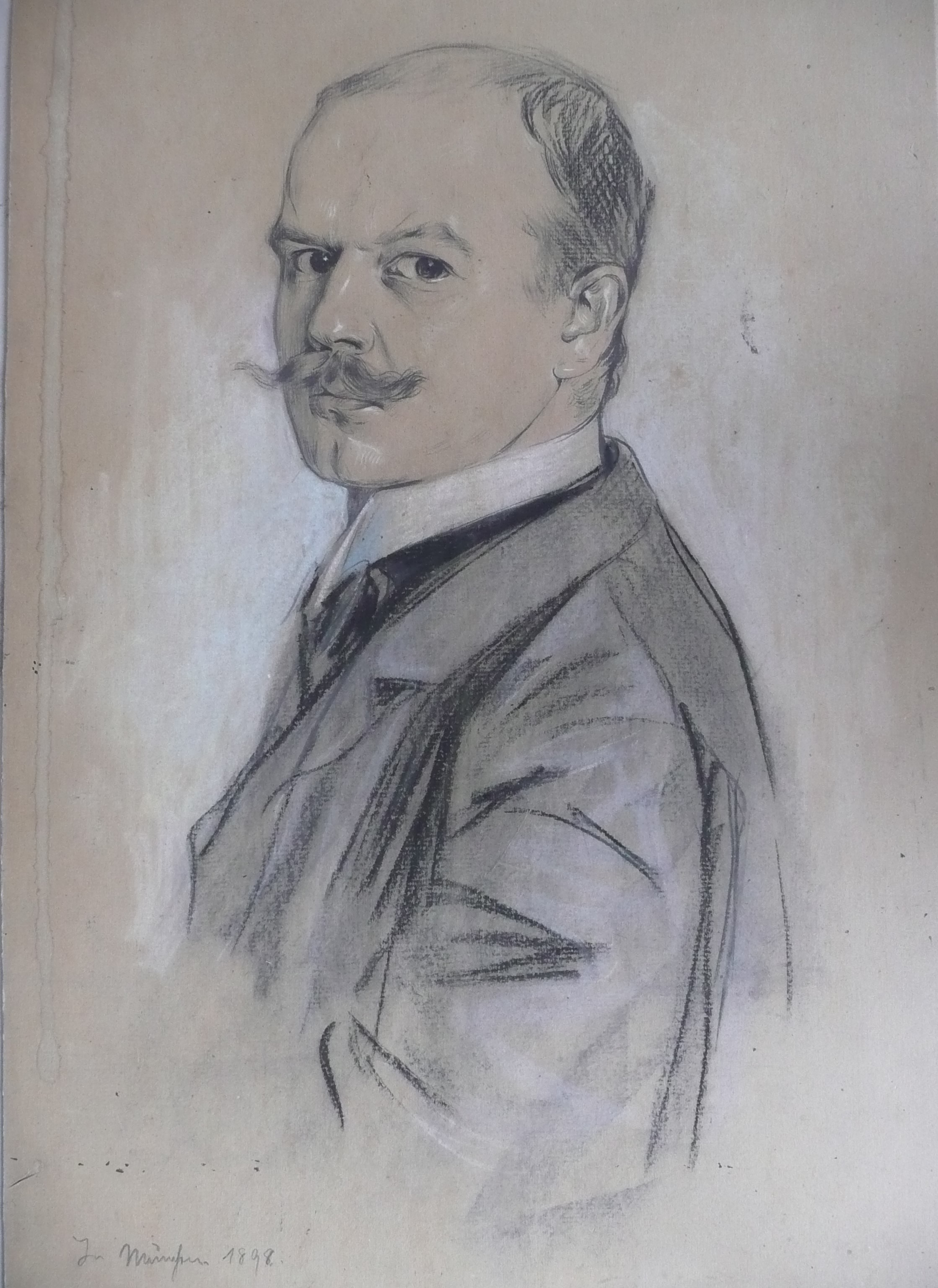 Selbstporträit von Max Vogel, gezeichnet in München 1898